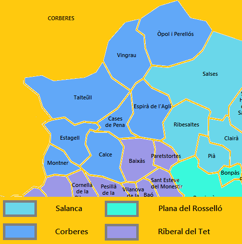 Mapa de les Corberes elaborat a partir d'un mapa de lliure disposició